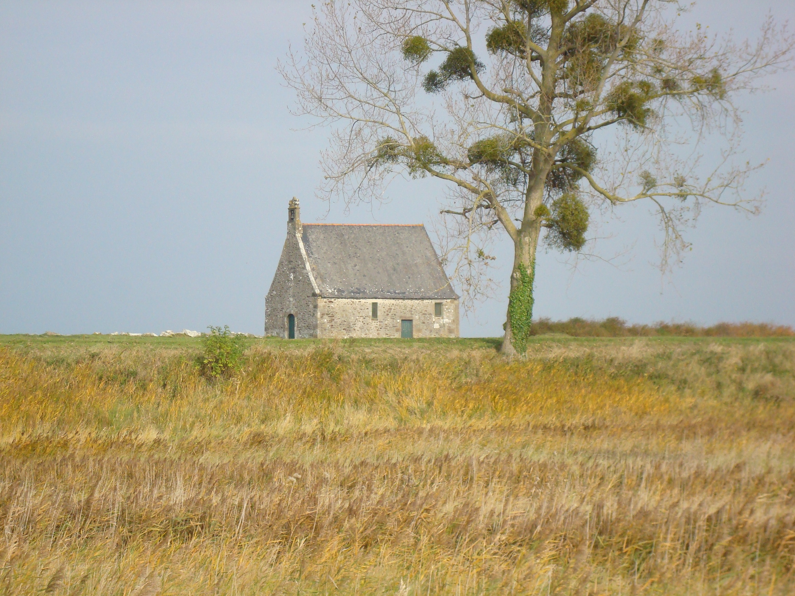 Chapel Santez Anna, Sant-Brewalaer, Bae Menez Mikael.